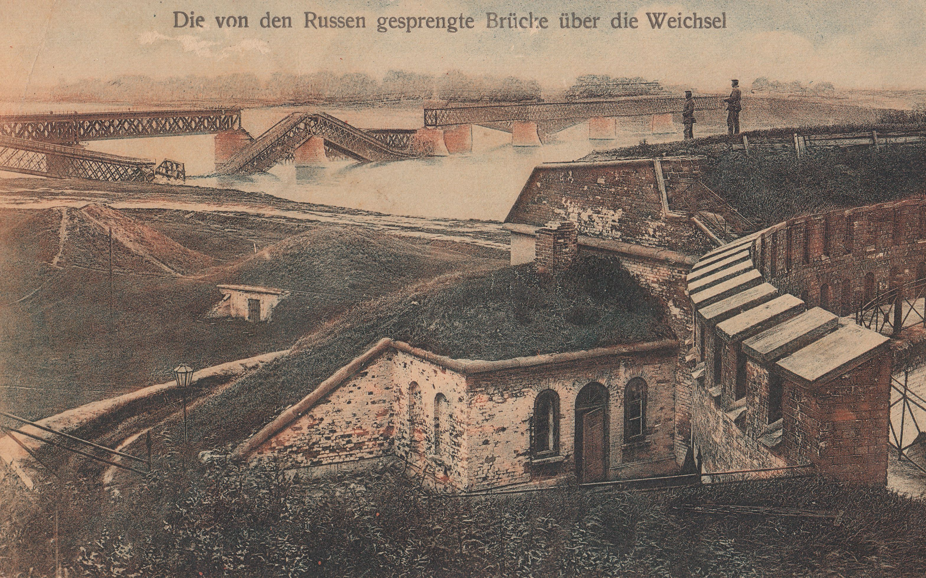 Fort Władymira (Legionów) i zniszczone mosty przy Cytadeli